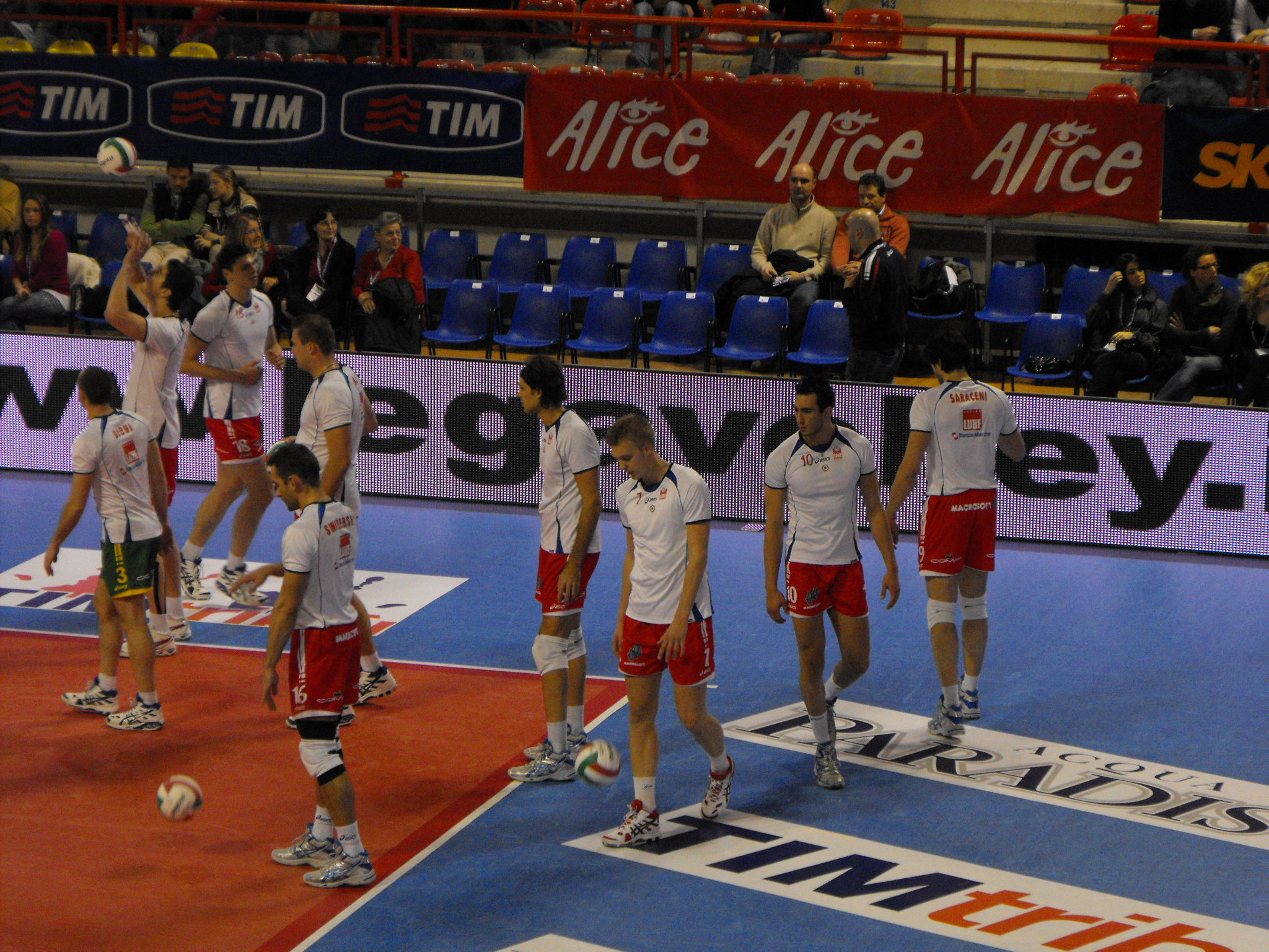 Riscaldamento di Macerata prima della partita di Coppa Italia 2009